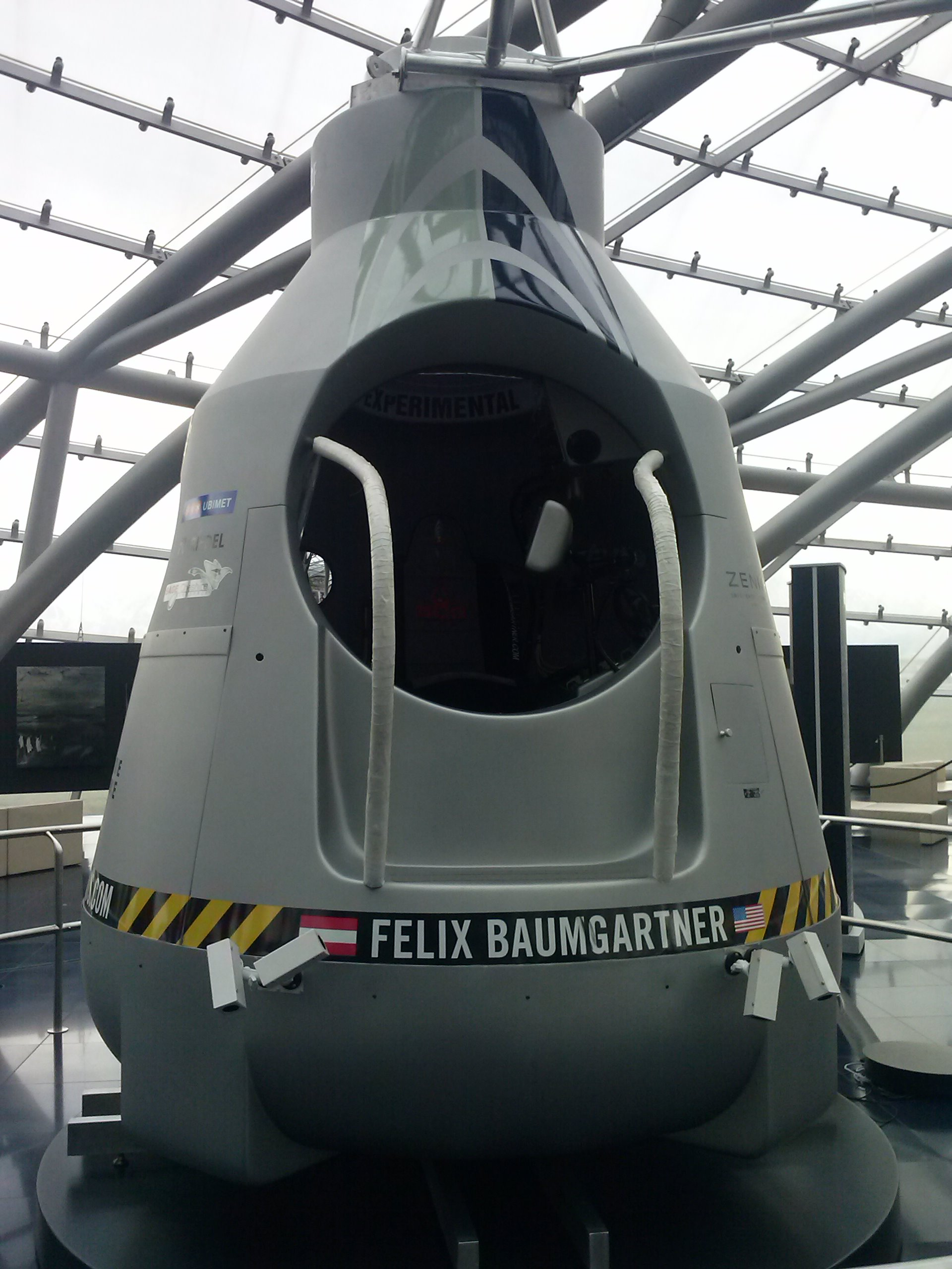 Kapsel von Felix Baumgartner